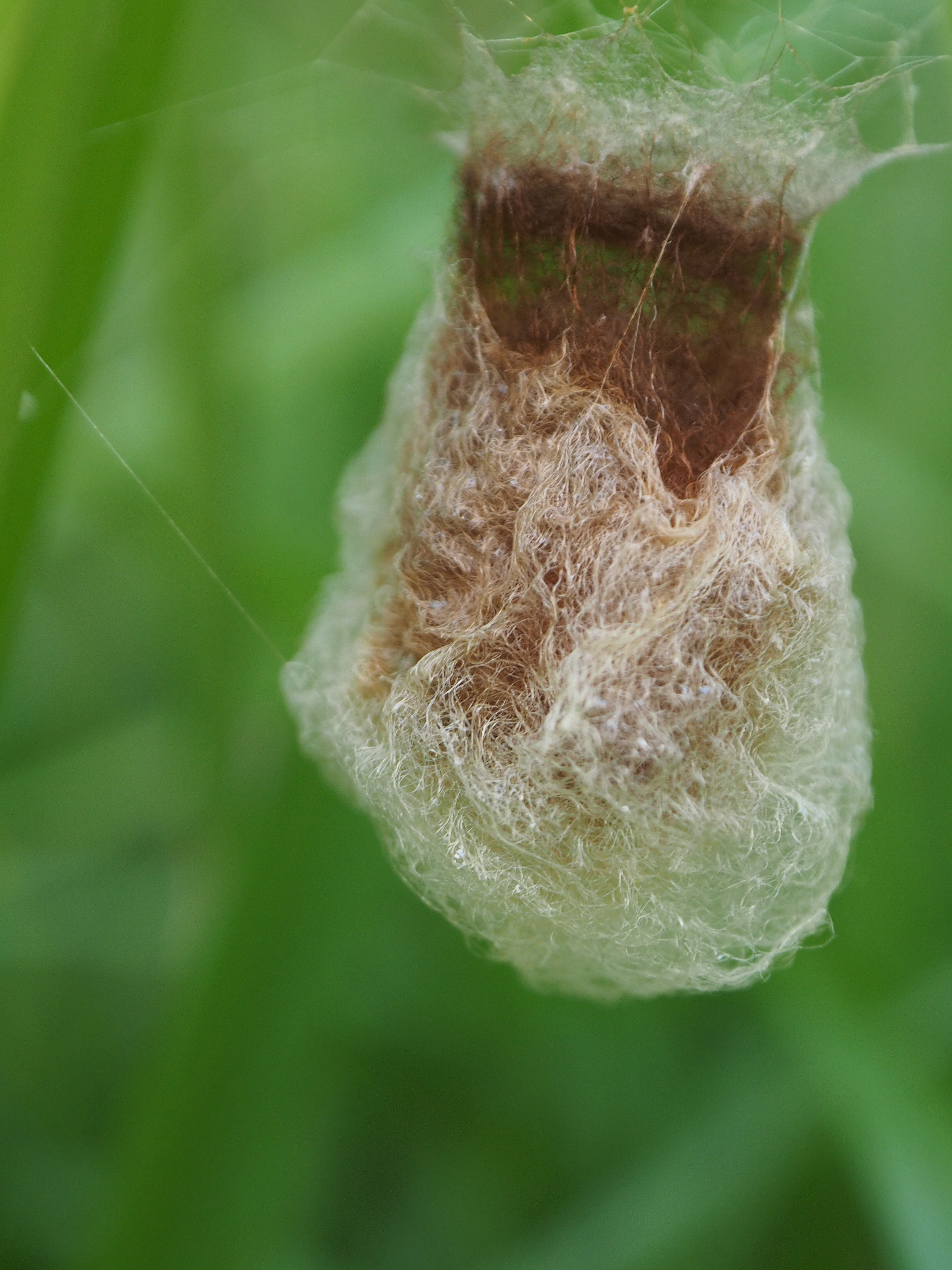 Kokon einer Wespenspinne im Naturpark Südheide (Germany)